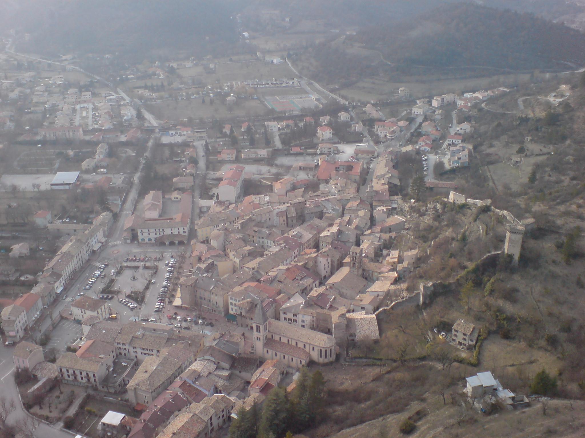 Vue de la ville de Castellane du rocher qui la domine, ancien site de la ville. Le clocher à toit pointu de l’église paroissiale cache la tour de l’Annonciade ; le clocher de Saint-Victor est visible à droite ; au-dessus, le donjon pentagonal classé ; à gauche, la place du marché, avec la fontaine classée ; au sud de cette place, un petit parking : entre les deux, la mairie (la façade principale, sur la place, n’est pas visible) ; partant de cette place, la route du col des Lèques, vers le nord-ouest et Digne-les-Bains, passe sous le pont-bâche. À gauche de cette route, la salle polyvalente. Le collège à toit de tuile forme une cour carrée ; de l’autre côté du parking blanc, se trouve la sous-préfecture, qui occupe un genre de villa, plus petite que la mairie .